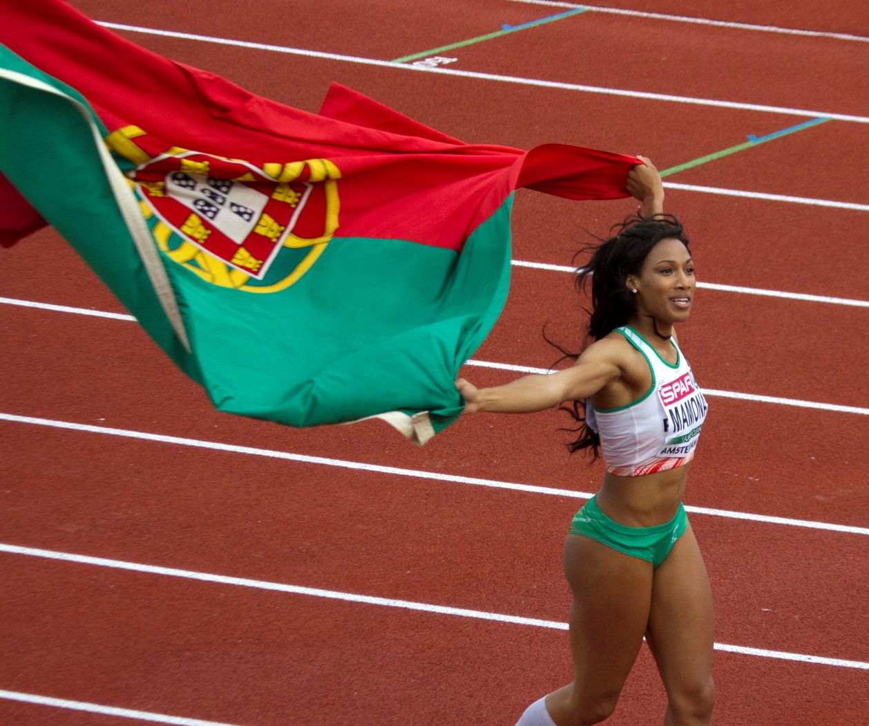 814 mamona hinkstapkampioene